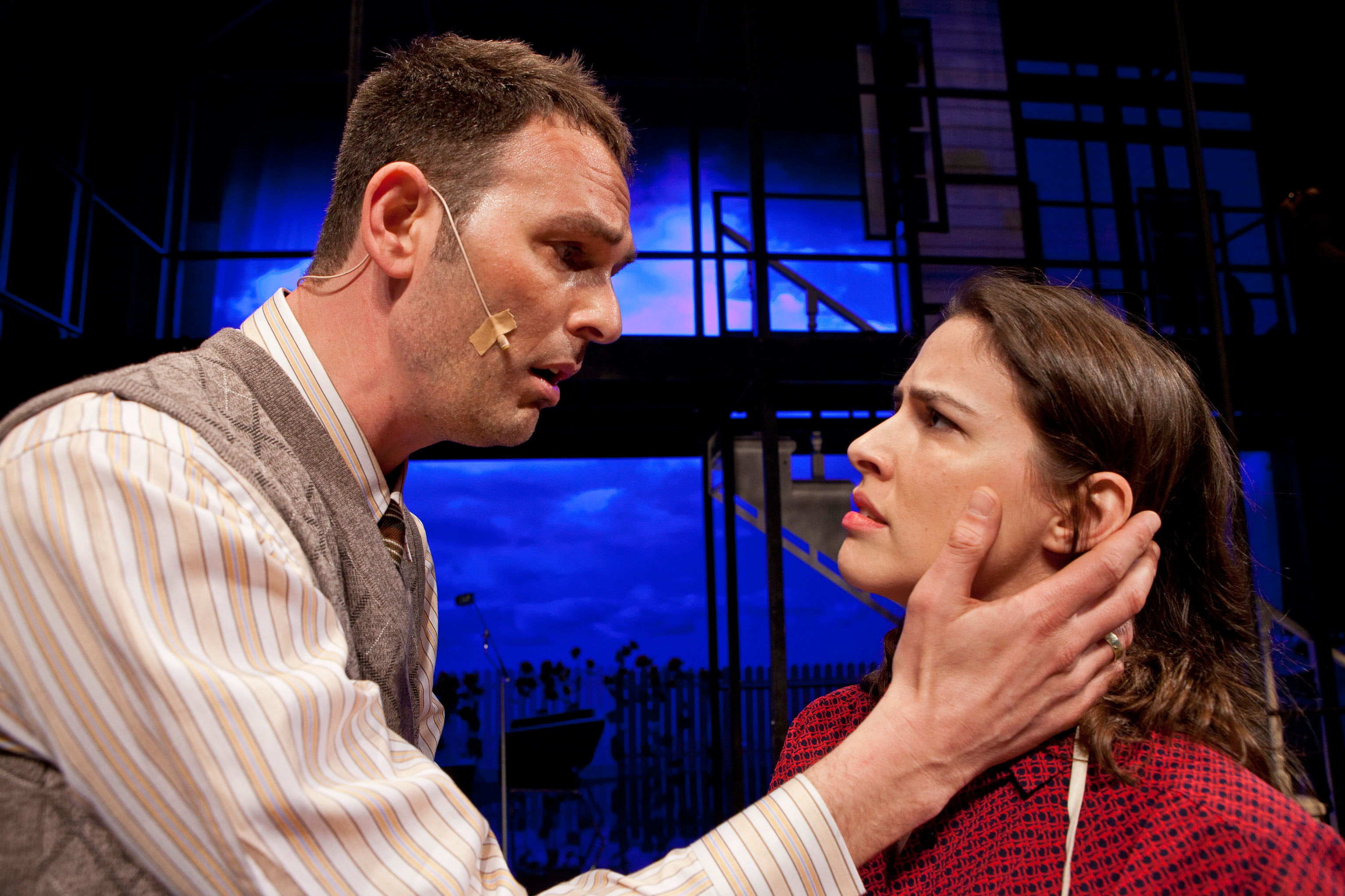 איילת רובינסון ודורון אורן באופרת הרוק כמעט נורמלי